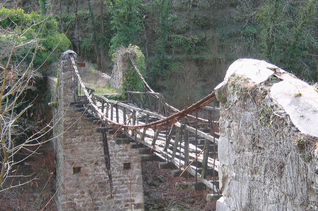 Pont de Moulin sur Cance ancien